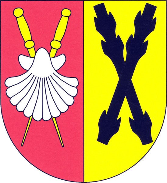 Znak obce Horní Libchava